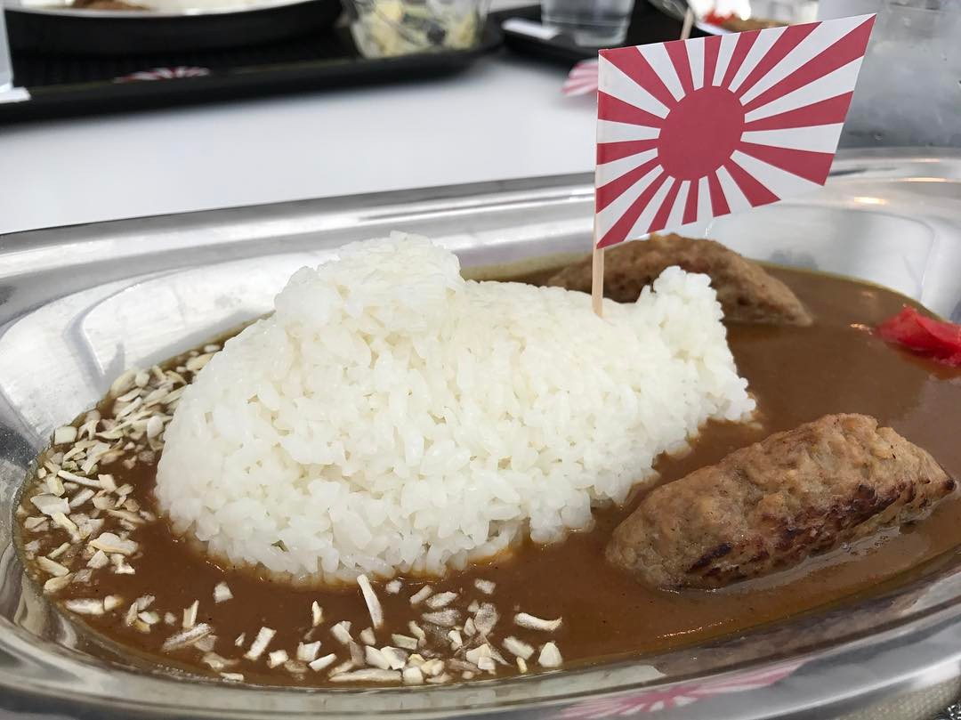 via Instagram ift.tt/2nEI7uv